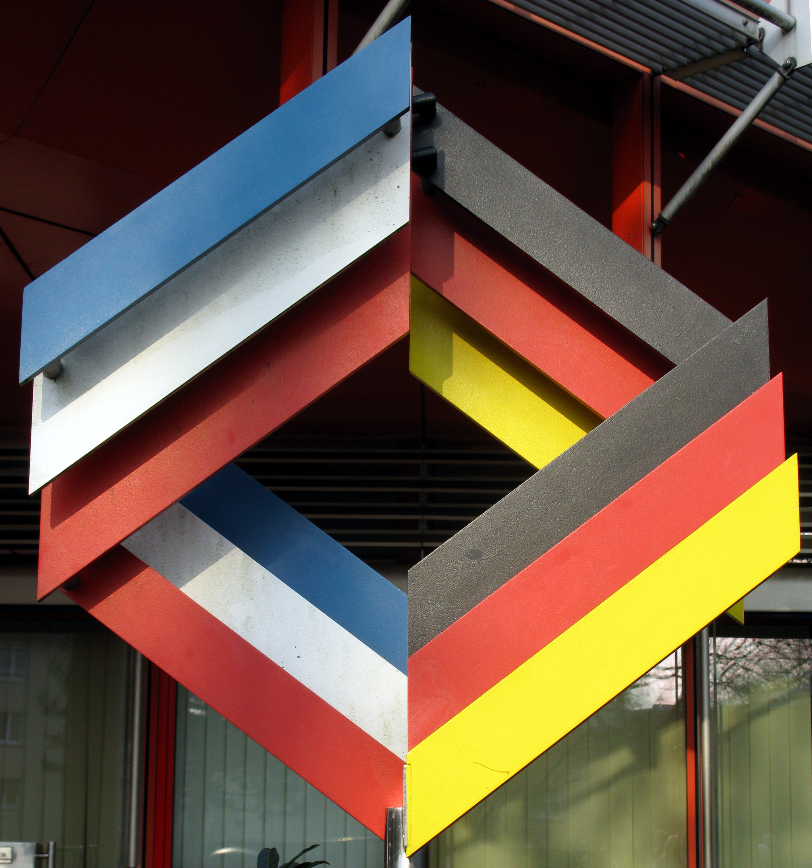 Nationalfarben am Deutsch-Französischen Gymnasium in Freiburg-Oberau